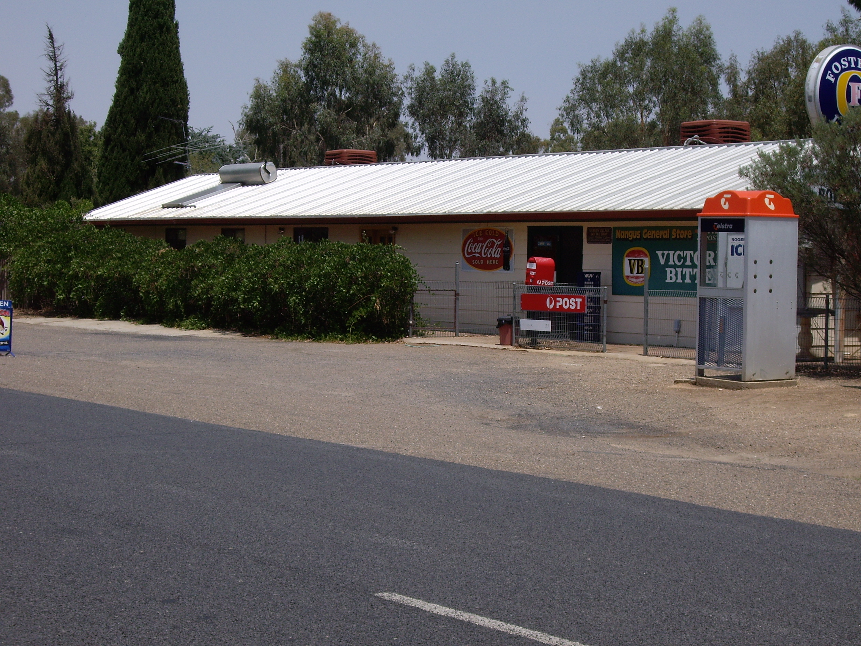 Nangus General Store